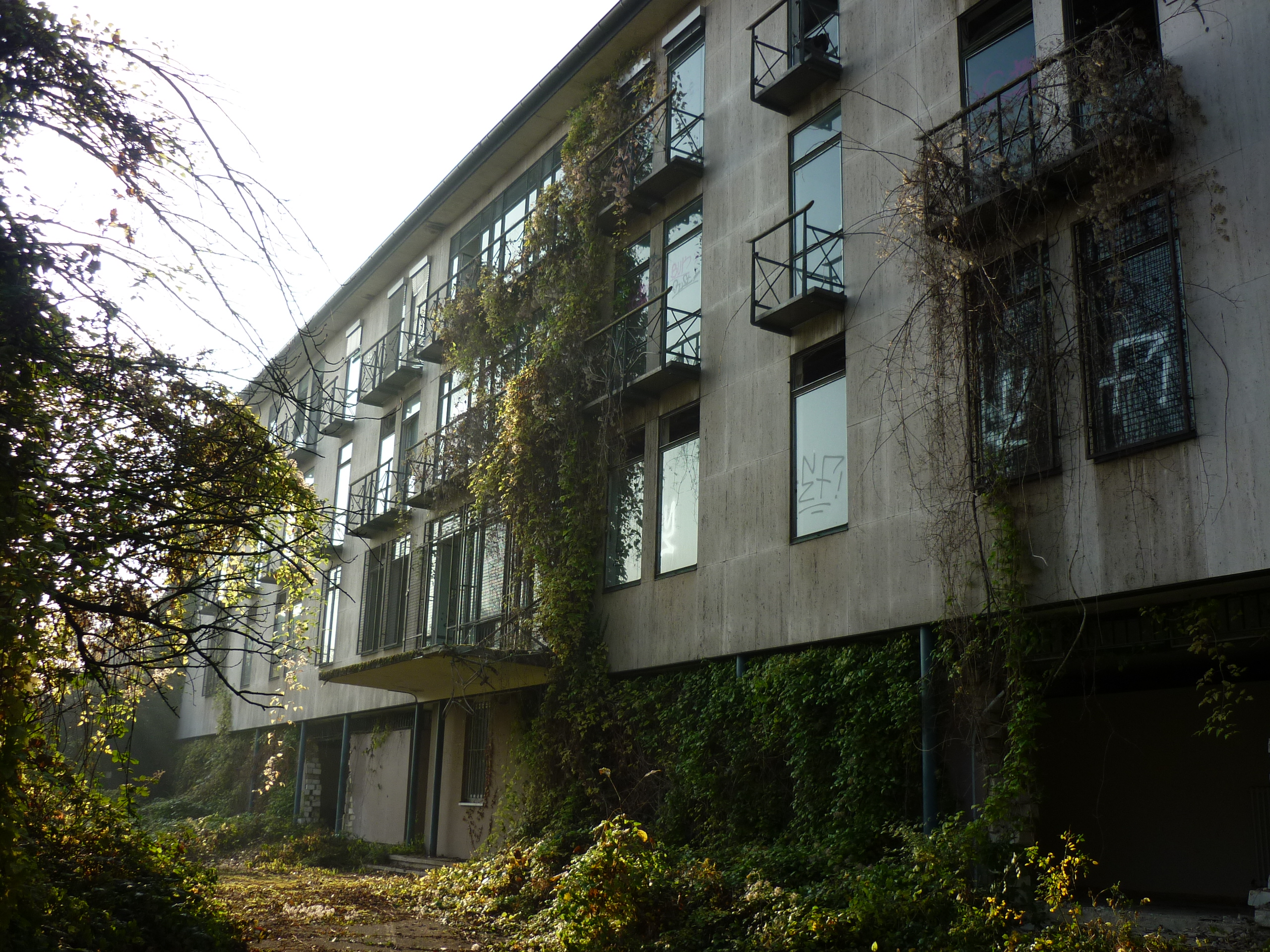 Ehemalige französische Botschaft (2012 abgebrochen), An der Marienkapelle 3/Rheinstraße 52, Bonn-Rüngsdorf